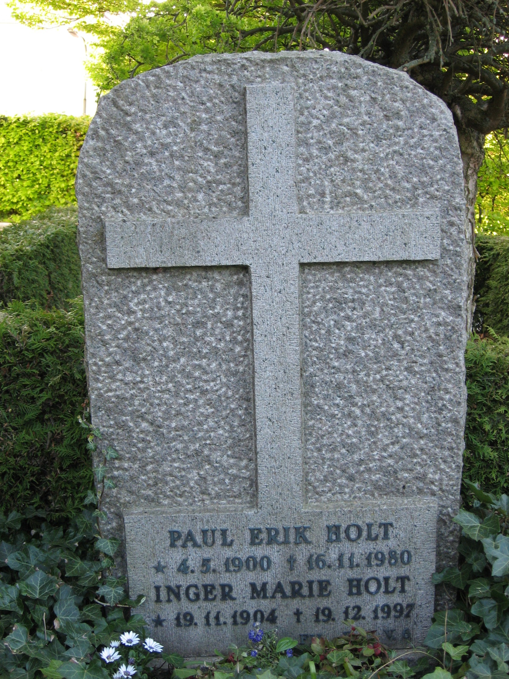 Hasle Kirke in Hasle, Århus, Denmark. Gravestone for Paul Holt (1900-1980) and wife.